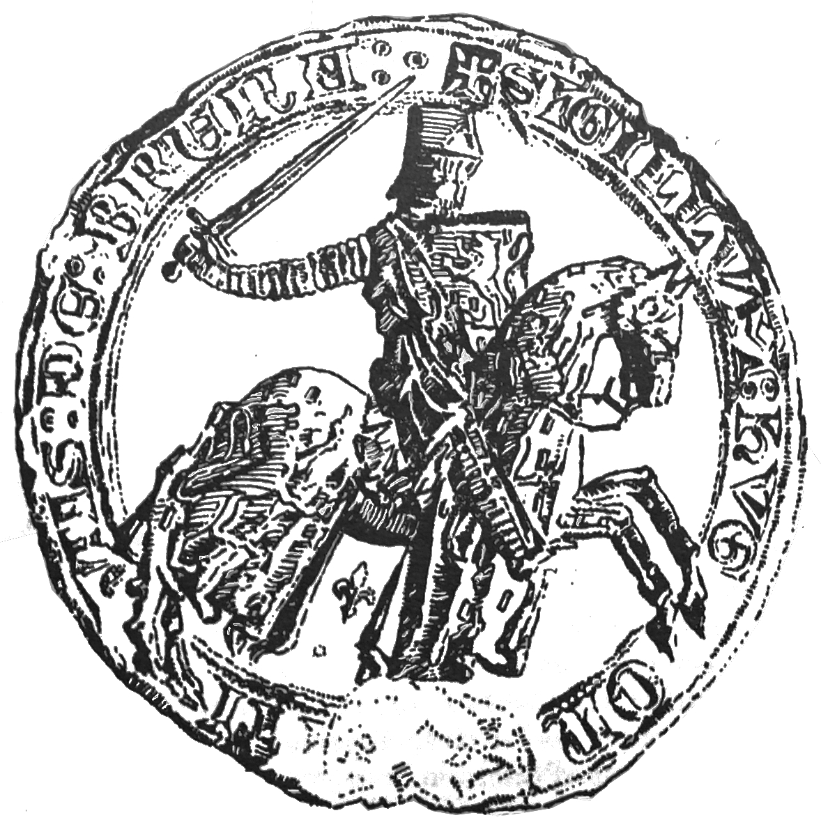 image de son sceau.